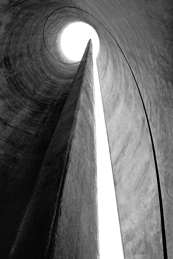 Bernard Kirschenbaum "Spiral" Malmö 1987. En 25 meter hög monolit i betong i Malmö hamn, skulpturen revs i samband med bygget av Citytunneln 2005.